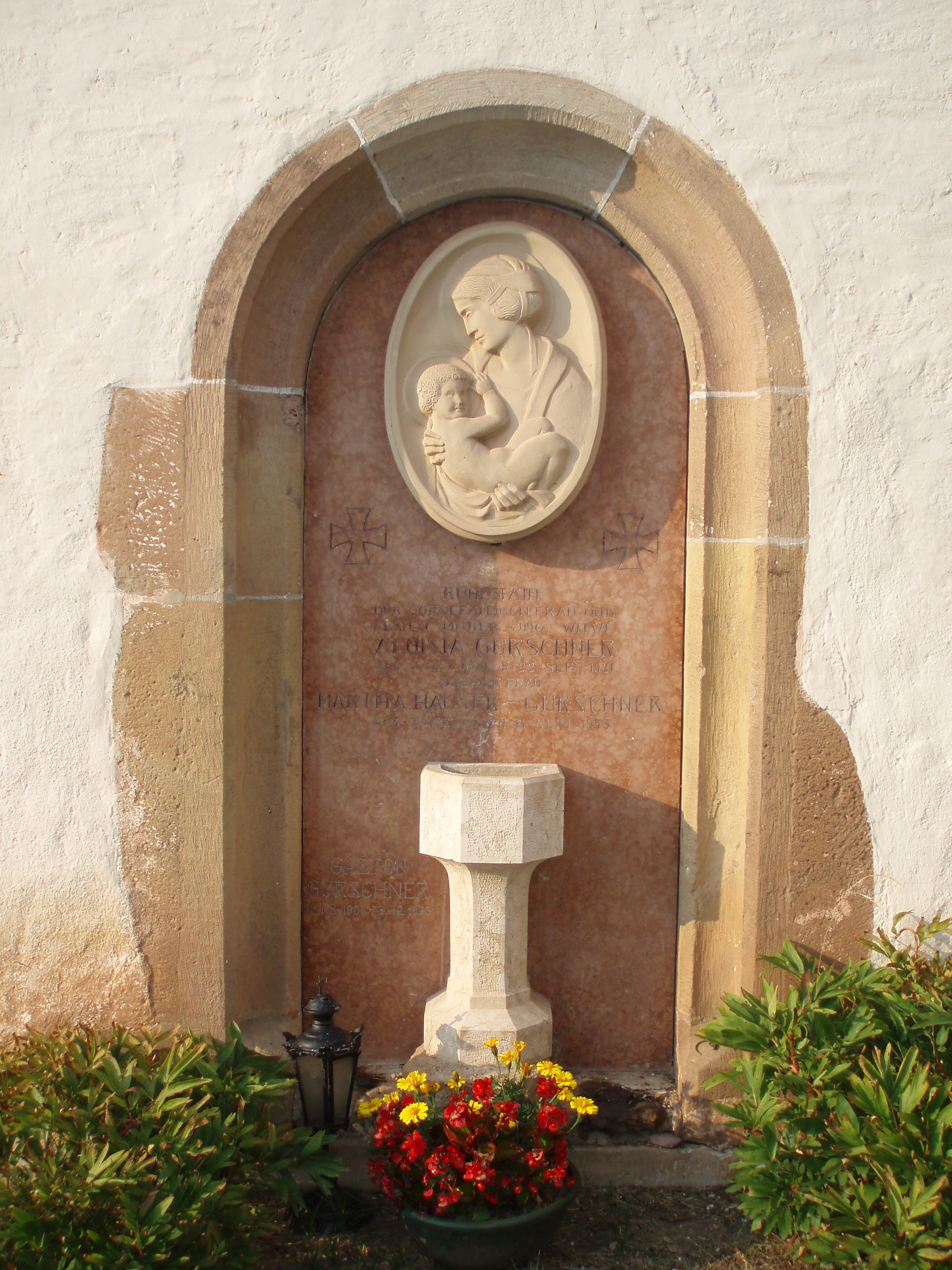 Grabstein der Aloisia Gurschner und der Martha Hauser Gurschner, Bildhauerarbeit von Gustav Gurschner (Sohn der Aloisia G.) an der St.-Anna-Kirche (direkt im Friedhof der Pfarrkirche Mölten gelegen)